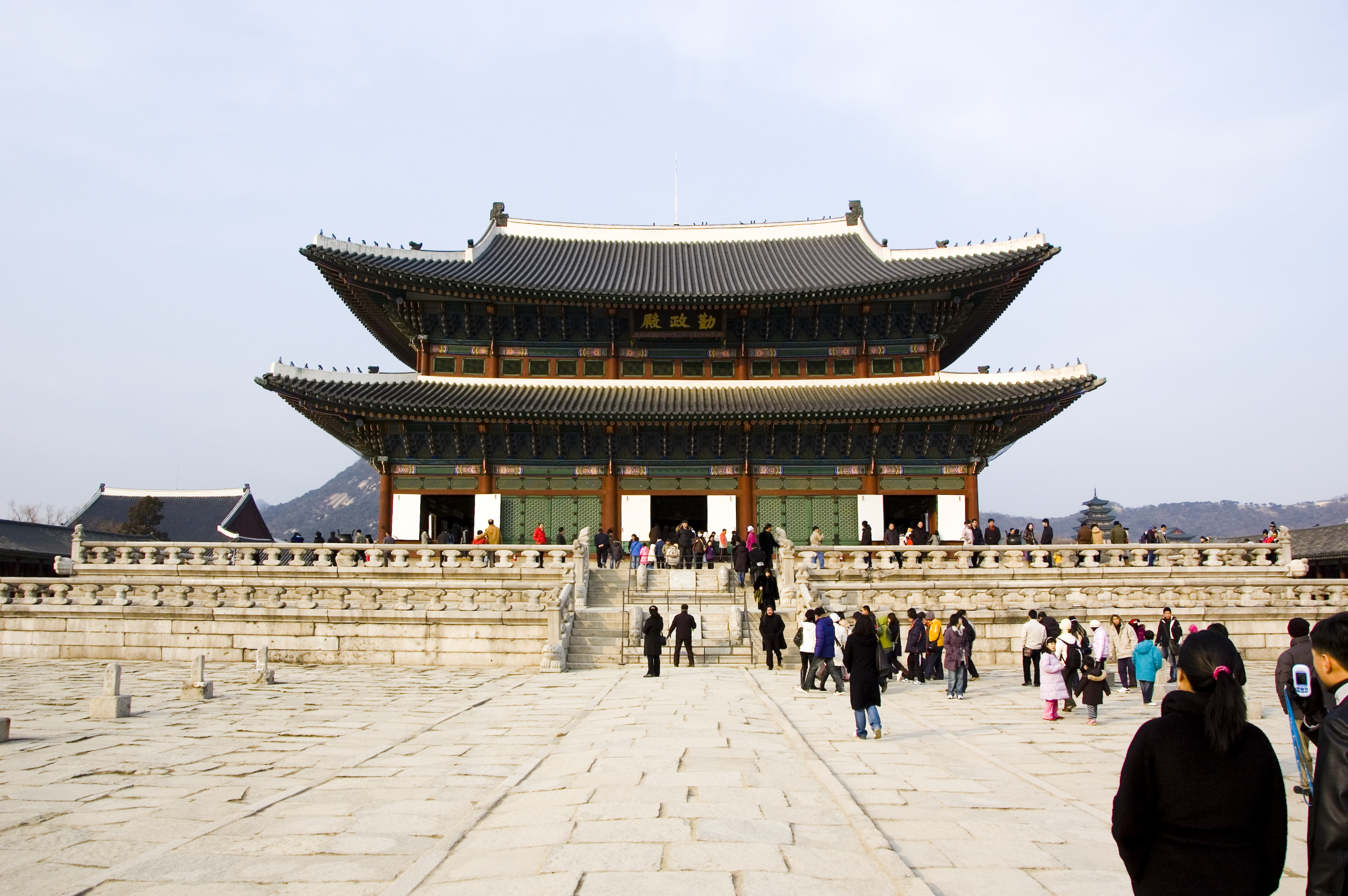 Geunjeongjeon